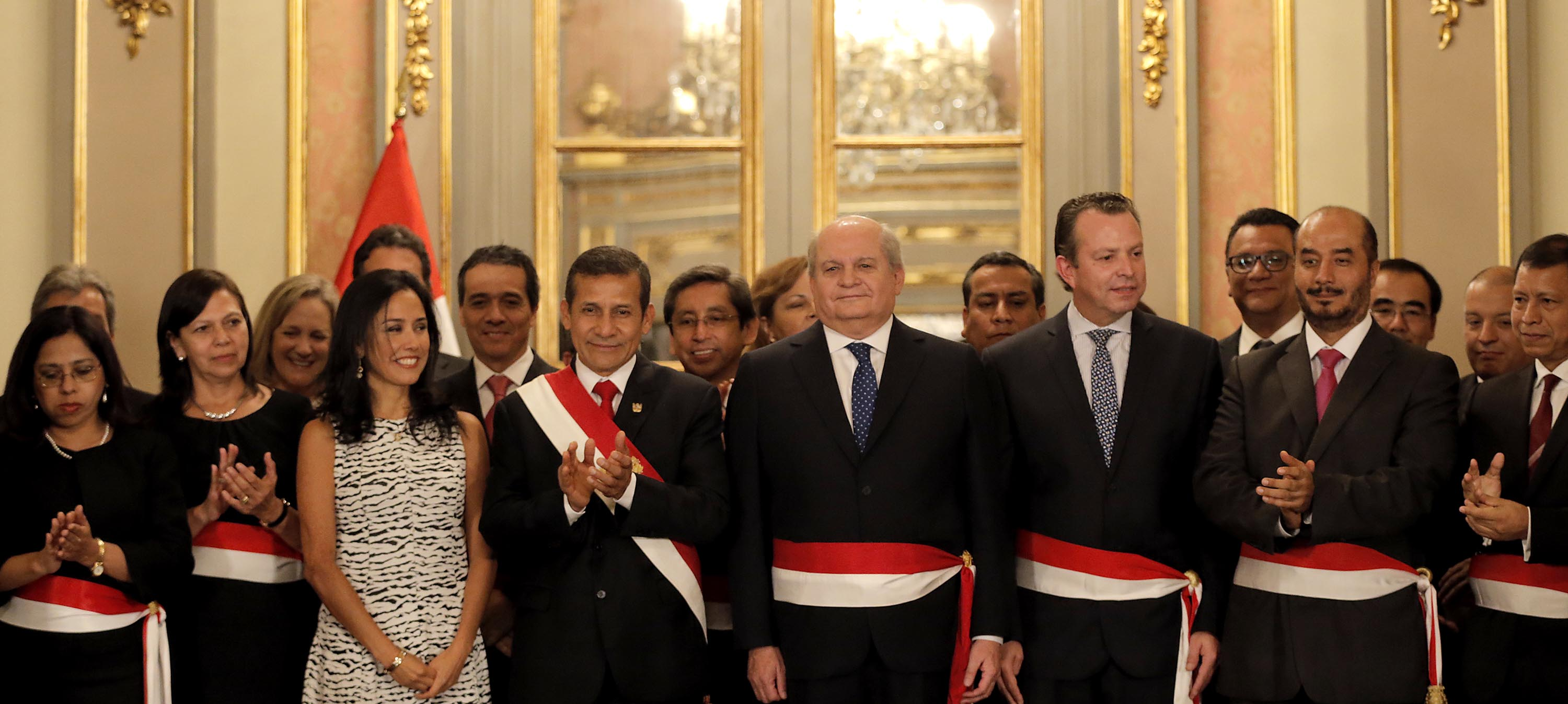 Juramentación del nuevo Gabinete. El señor Jakke Valakivi Álvarez juramentó ante el Presidente de la República Ollanta Humala, como nuevo ministro de Estado en el despacho de Defensa, dentro del gabinete que preside Pedro Cateriano Bellido.